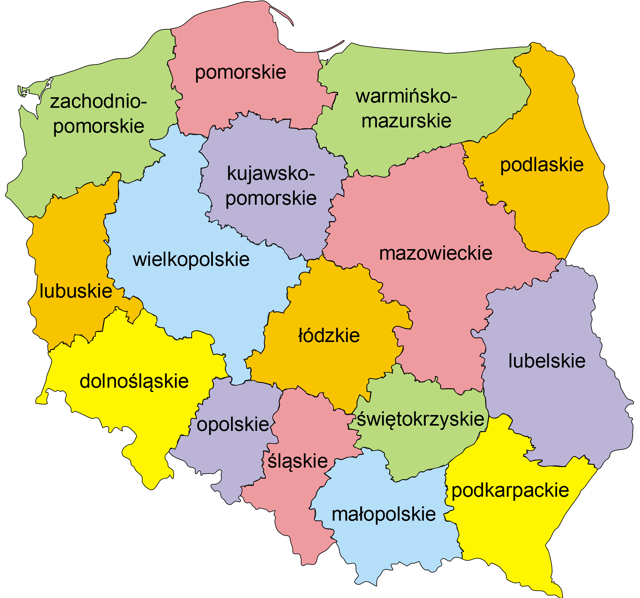 Jednostki NUTS2 (województwa) w Polsce